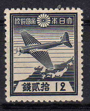 日本で1939年12月1日に発行された12銭普通切手。描かれているのは航技研が製作した航研機とよばれる航空記録用の機体である。